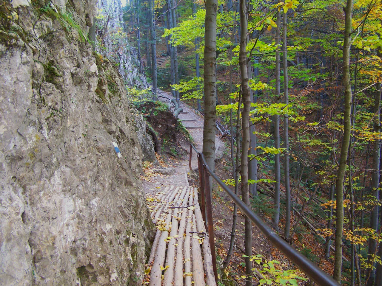 Góra Zamkowa (Pieniny))